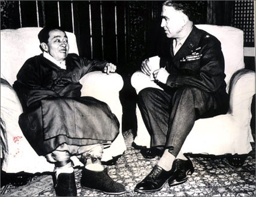 김규식과 미군정청의 스틸웰